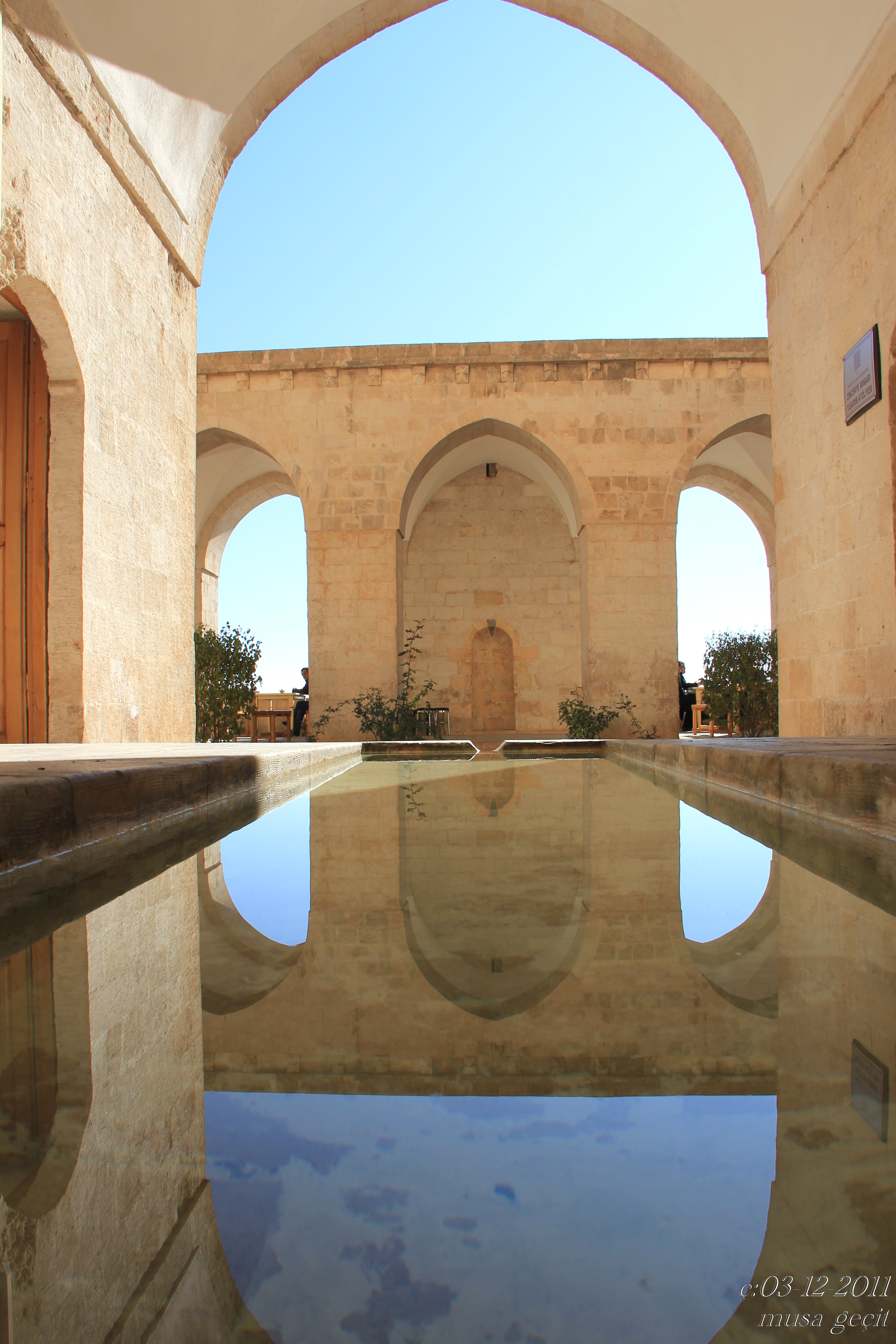 Mardin Tarihi Kentten